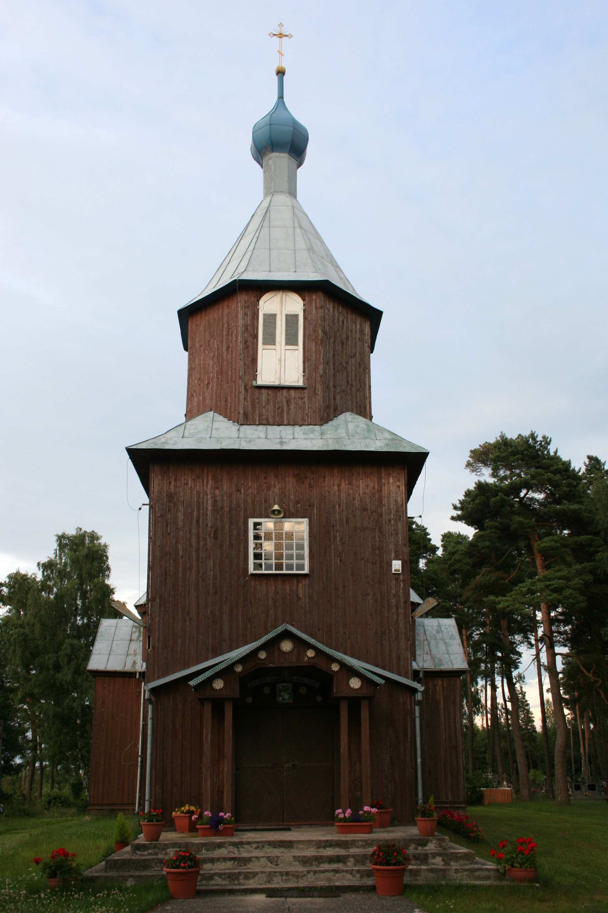 Cerkiew św. Antoniego Peczerskiego w Kuraszewie.